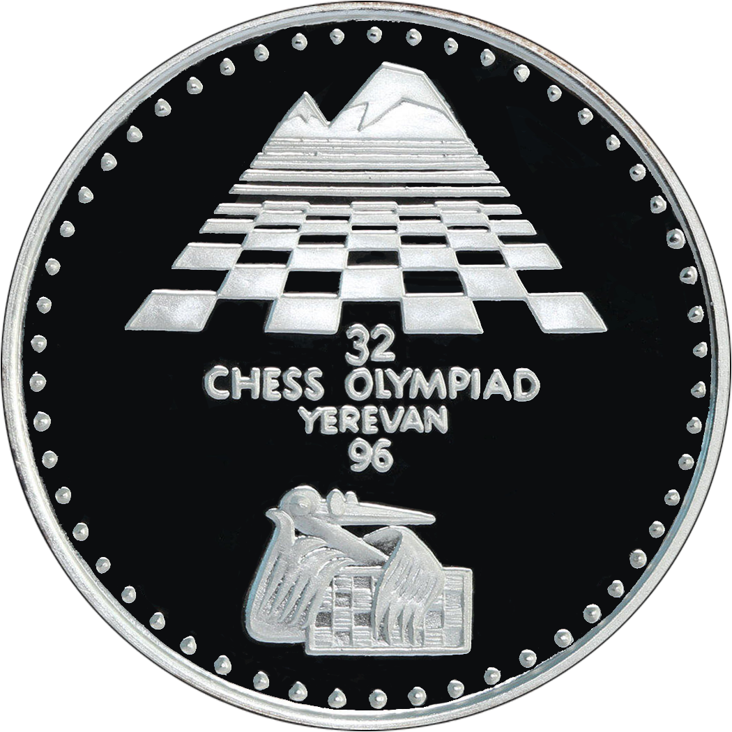 Памятная монета Армении 1996 года, посвящённая 32-й шахматной Олимпиаде - 100 драм - серебро 999